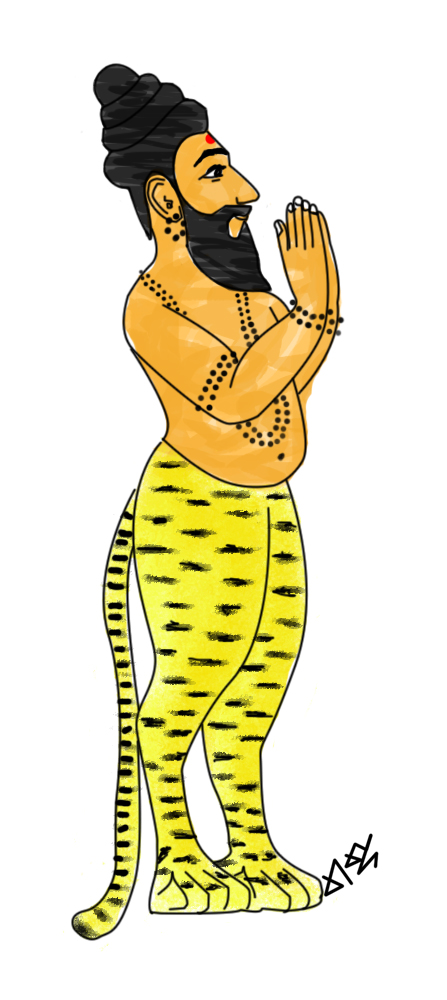 புலிக்கால் முனிவர்